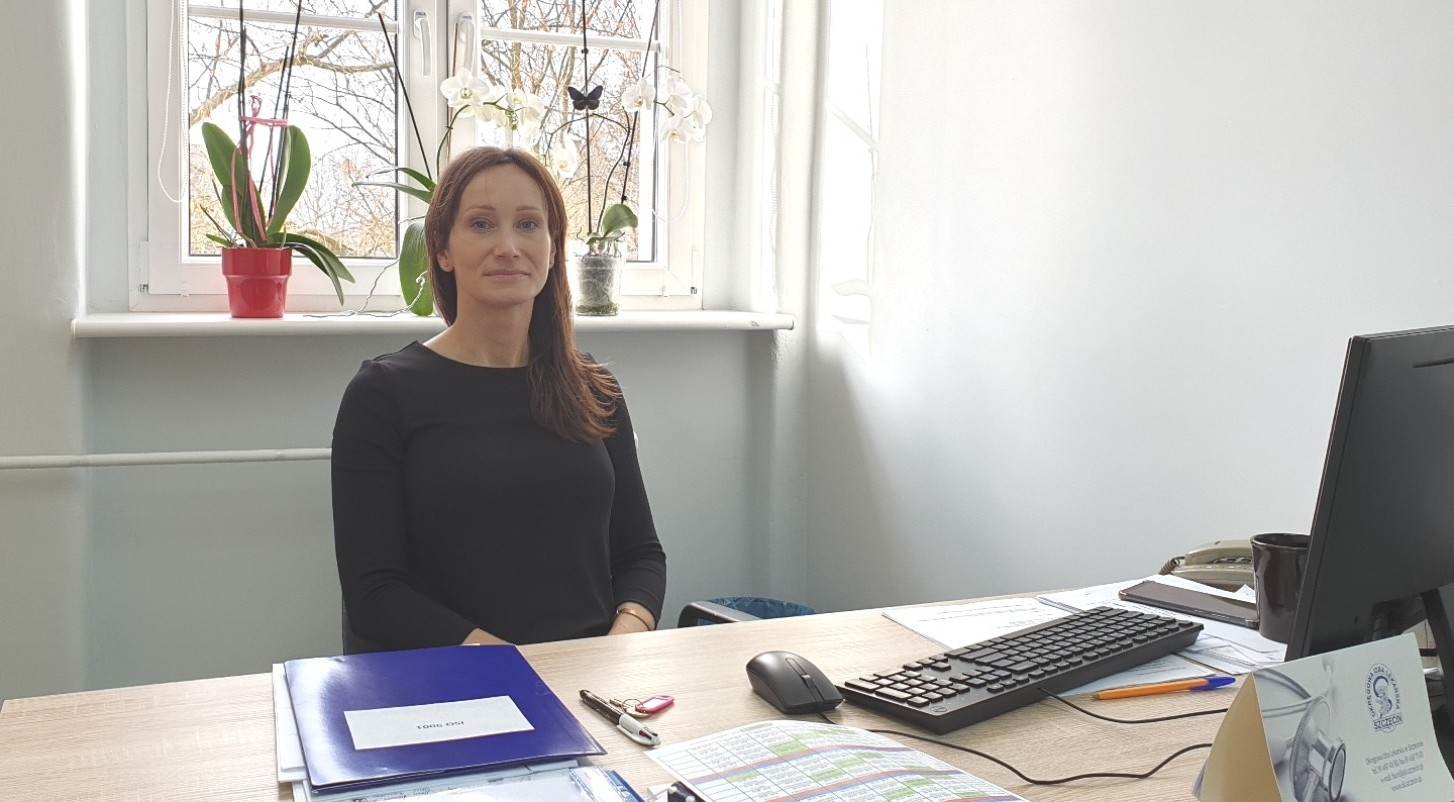 WSPL SP ZOZ w Stargardzie. Lekarz medycyny pracy Monika Leder